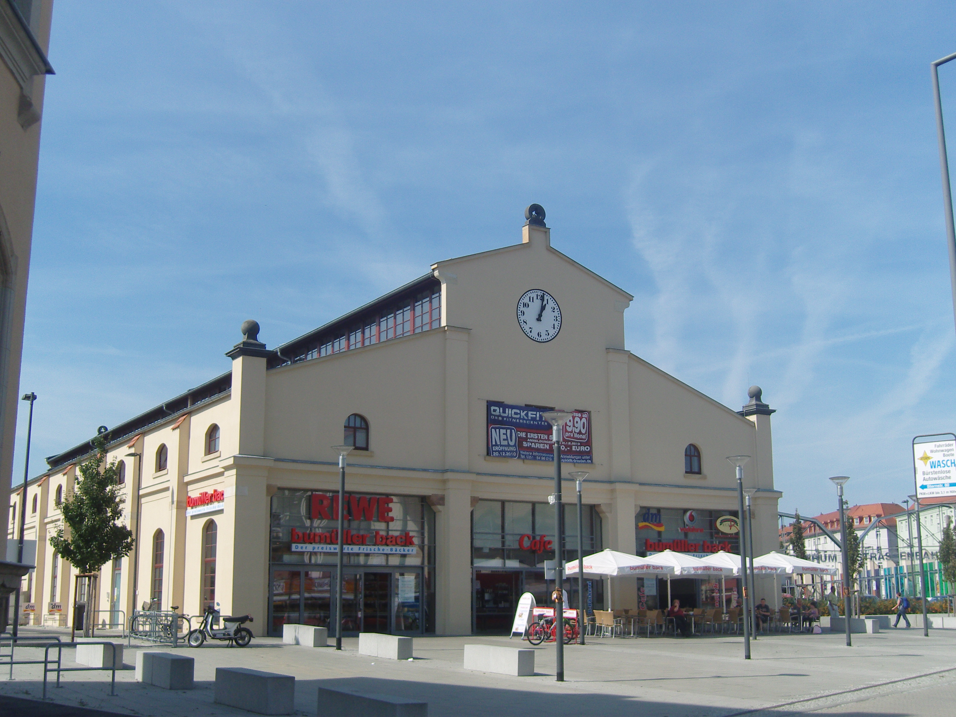 Denkmalgeschützter Straßenbahnhof Mickten an der Leipziger Straße